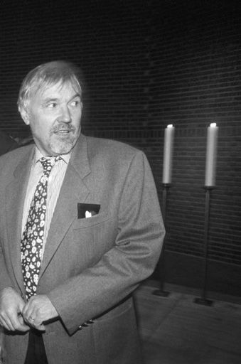 Herbert Riehl-Heyse 1995 in einer Münchner Kirche, in der er zuvor einen Vortrag gehalten hatte